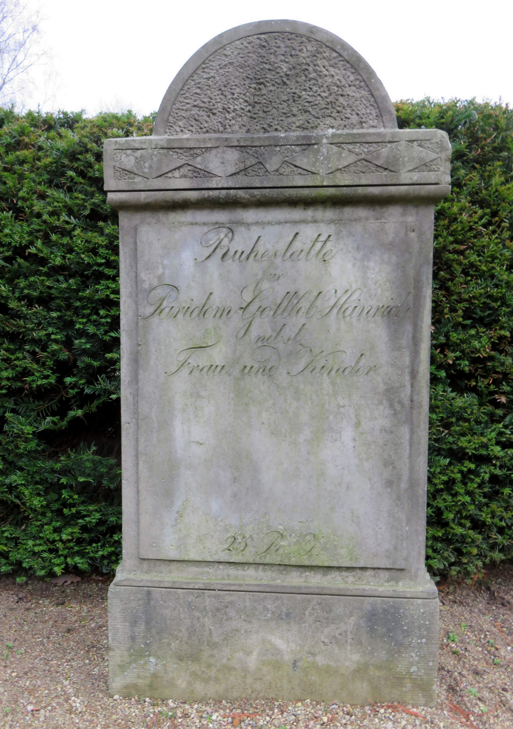 Grabmal für den Hamburger Vermessungsingenieur Paridom Gottlob Heinrich (1787–1864) im Grabmal-Freilichtmuseum Heckengarten auf dem Hamburger Friedhof Ohlsdorf, Inschrift bei .